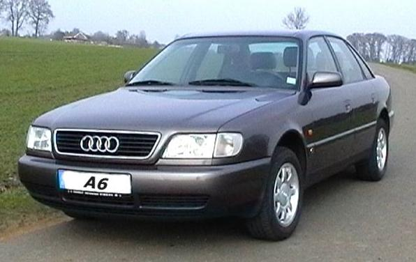 Audi A6 C4 Limousine Baujahr 1996